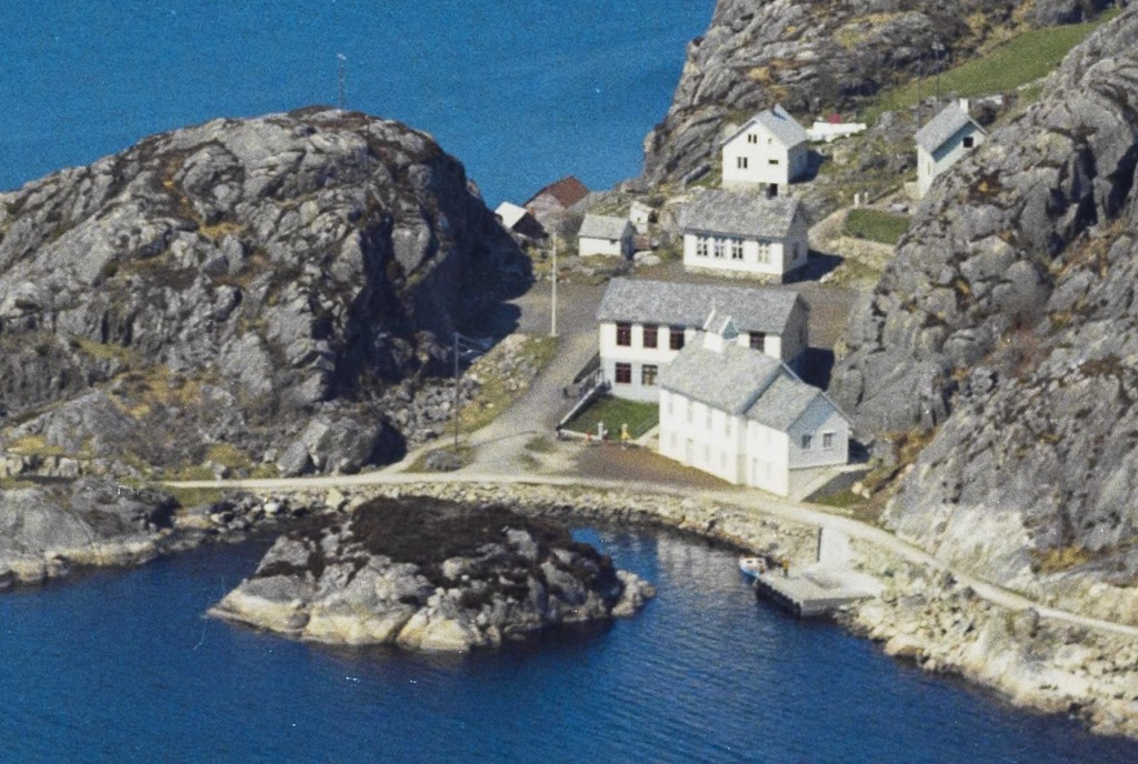 Brandasund bedehuskapell i Bømlo kommune